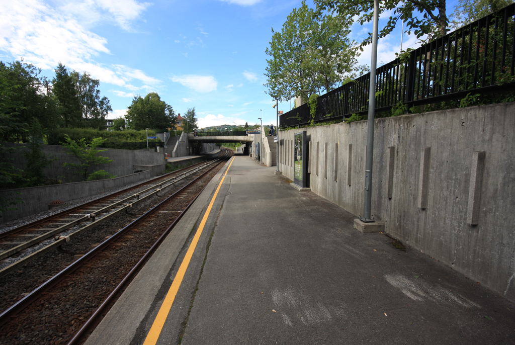 Hele Makrellbekken T-banestasjon. Sett fra sydenden på Spor 2. Mot Hovseter.